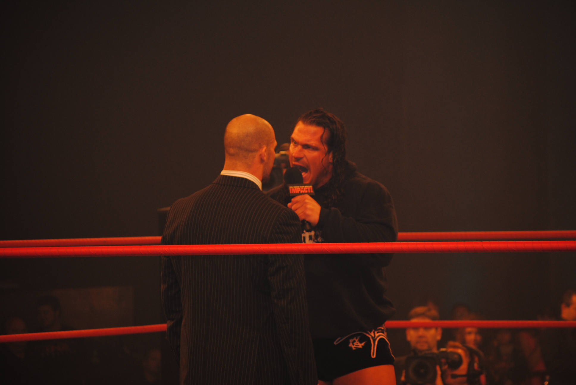 Rhino vs. Kurt Angle